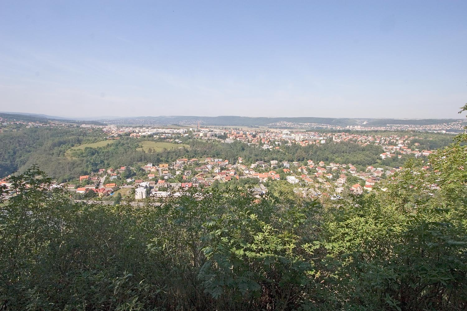 Zbraslav_-_pohled_od_vyhlídkového_altánu_na_úbočí_kopce_Závist